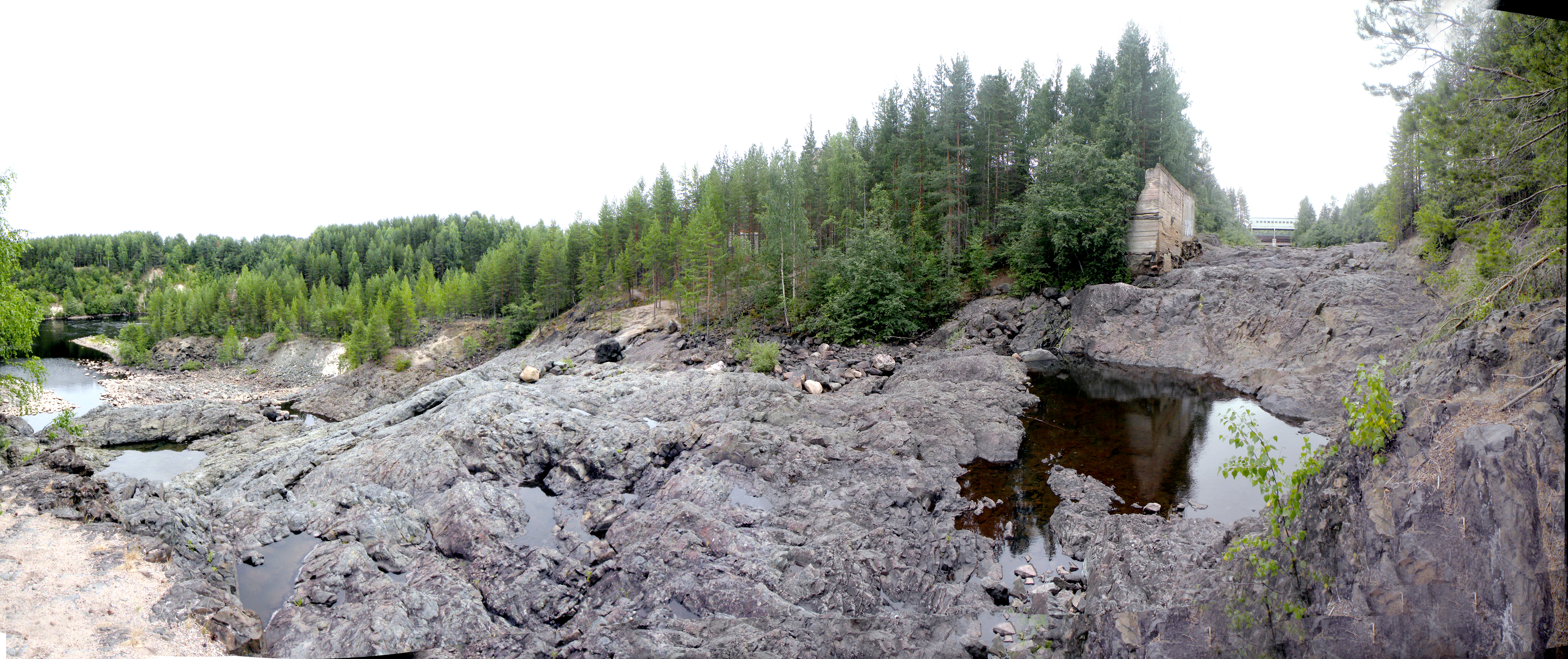 Сухое ложе водопада Гирвас в Карелии